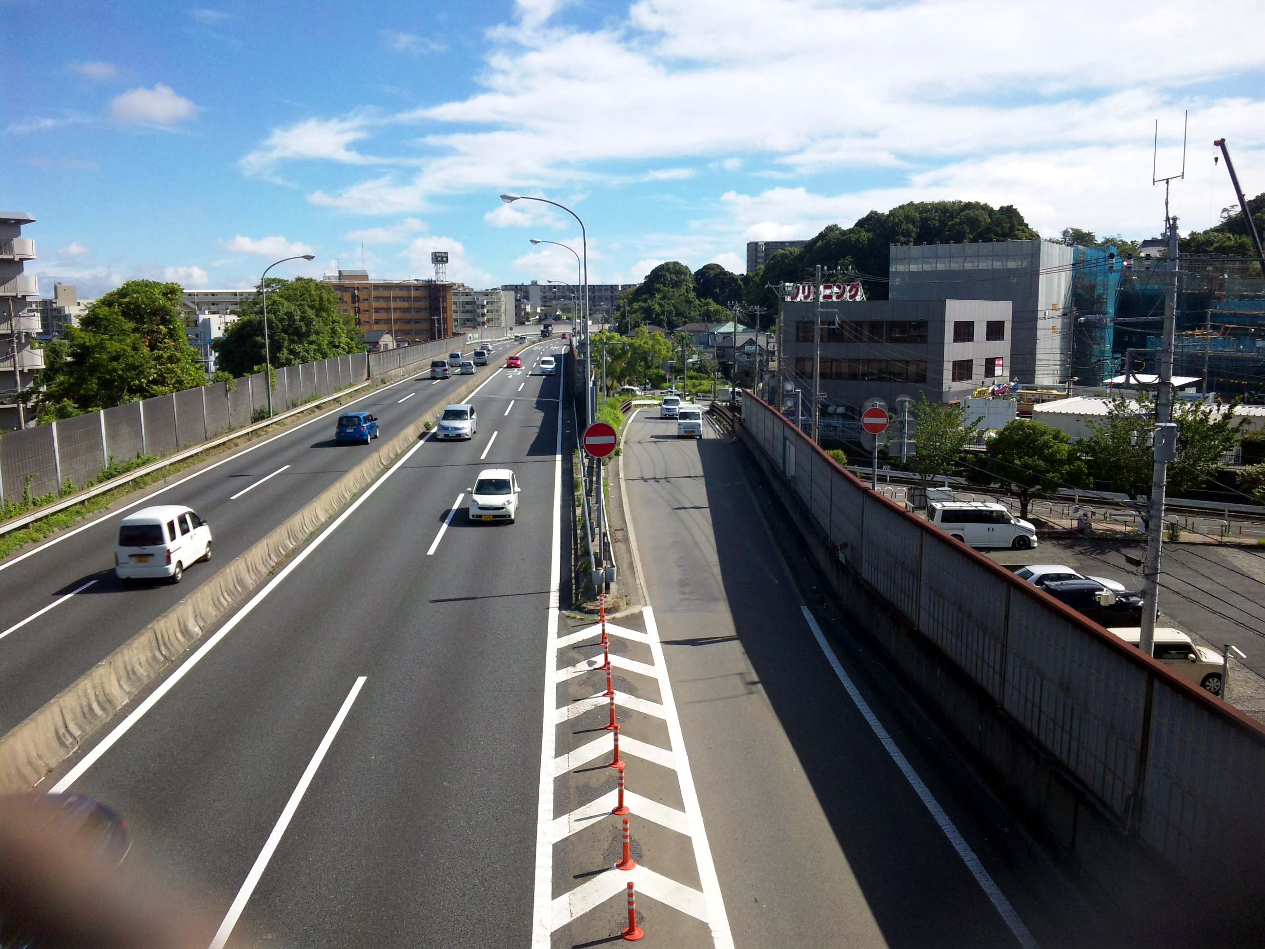 横浜新道ja:上矢部インターチェンジ上り入口